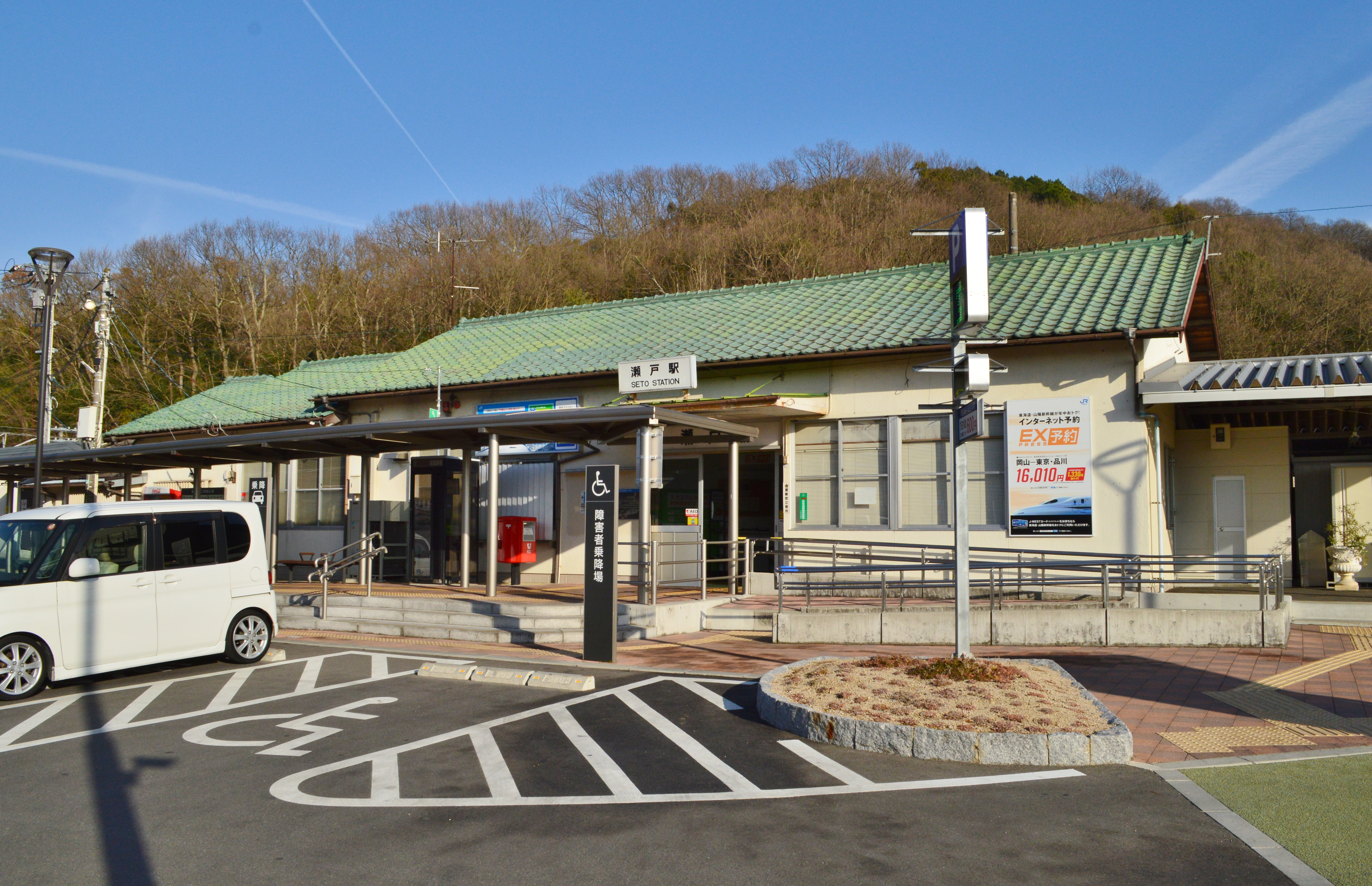 瀬戸駅 駅舎 Nikon D3200